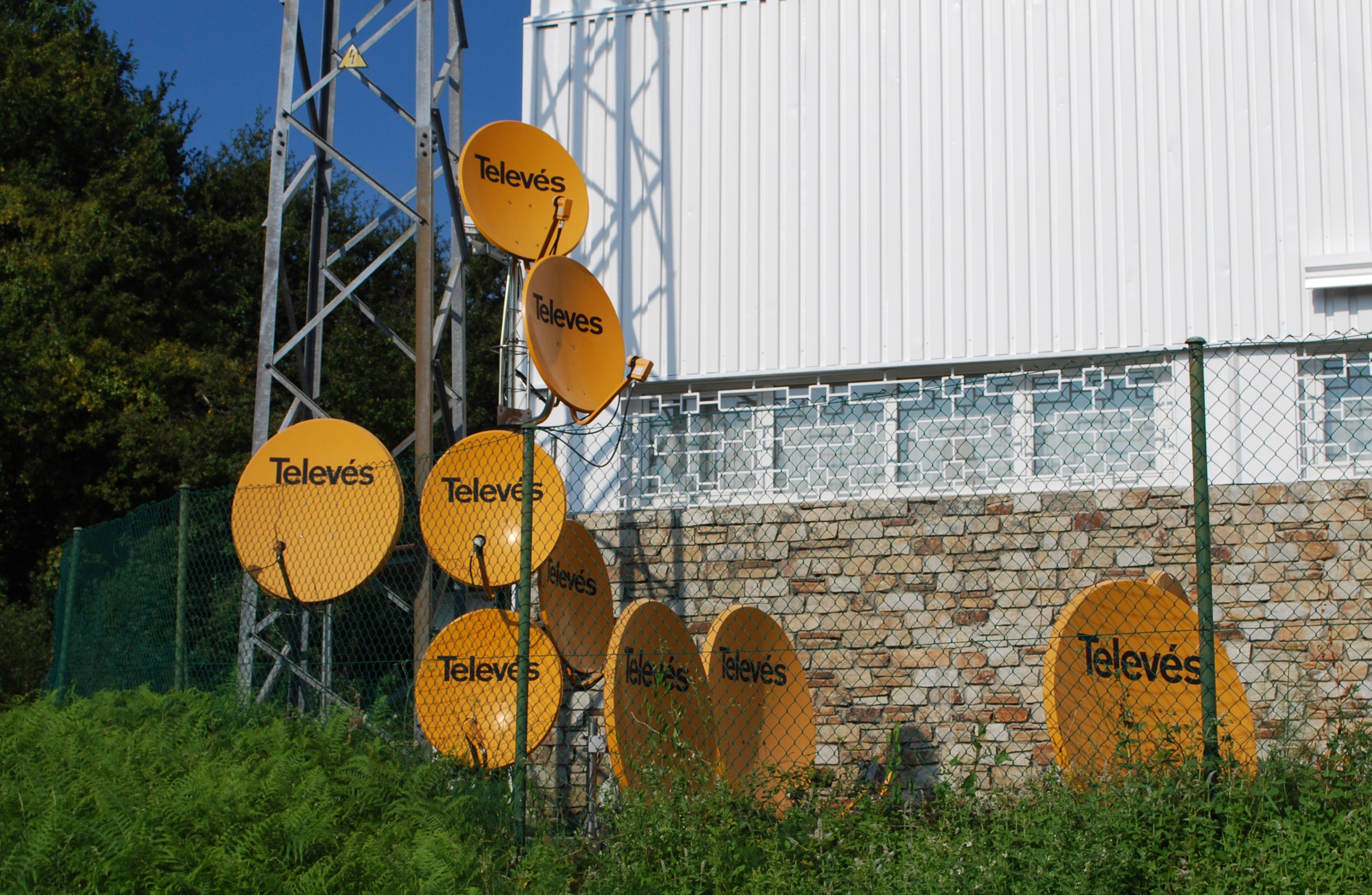 Televés antenas parabólicas, Conxo Compostela A Coruña Galiza Spain